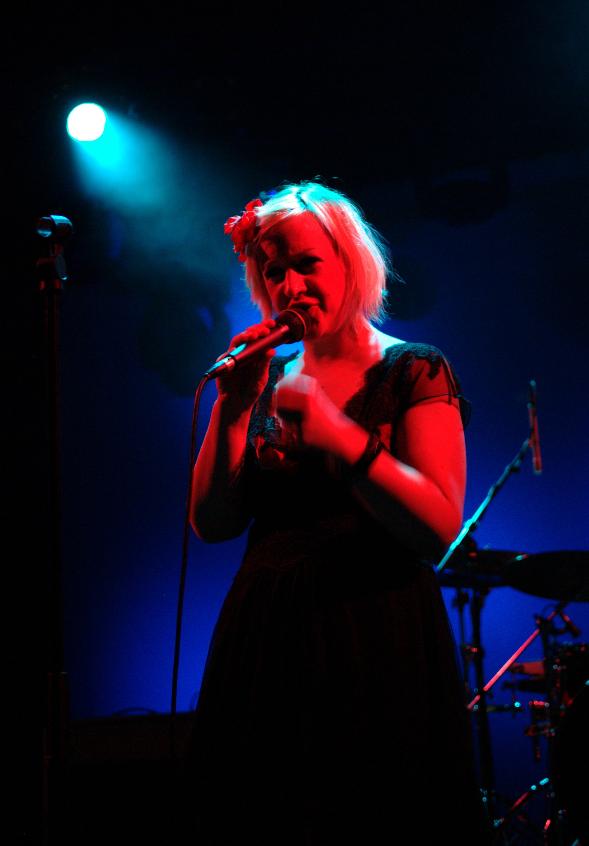 Alice Russell